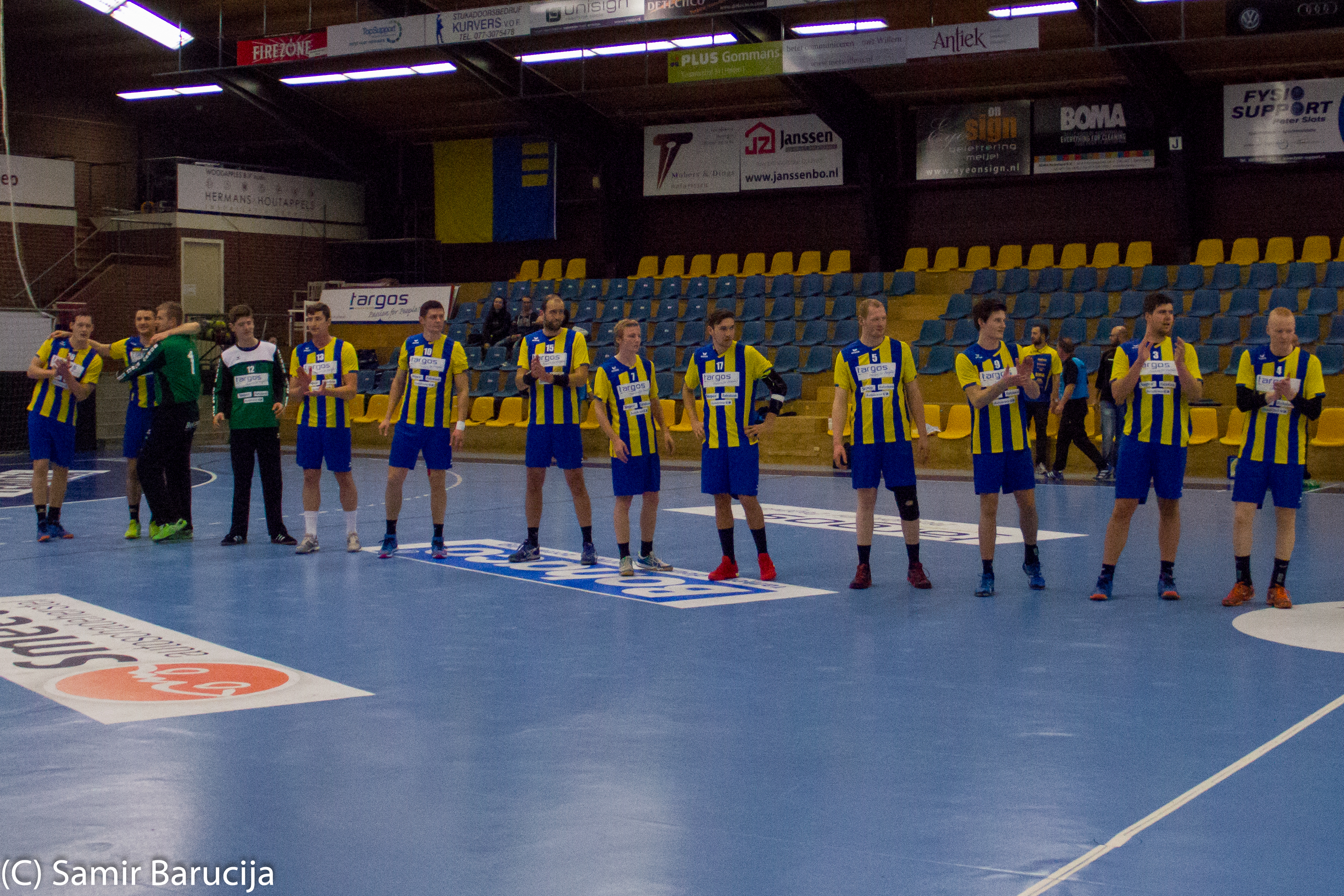 Targos Bevo - APai/Aristos Matthijs Vink